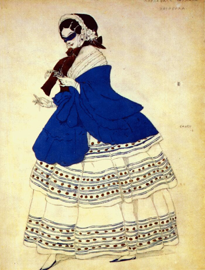 Estrella. Эскиз костюма для "Карнавала" Шумана. 1910